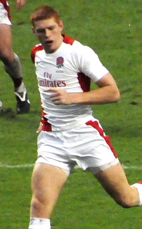 James Rodwell